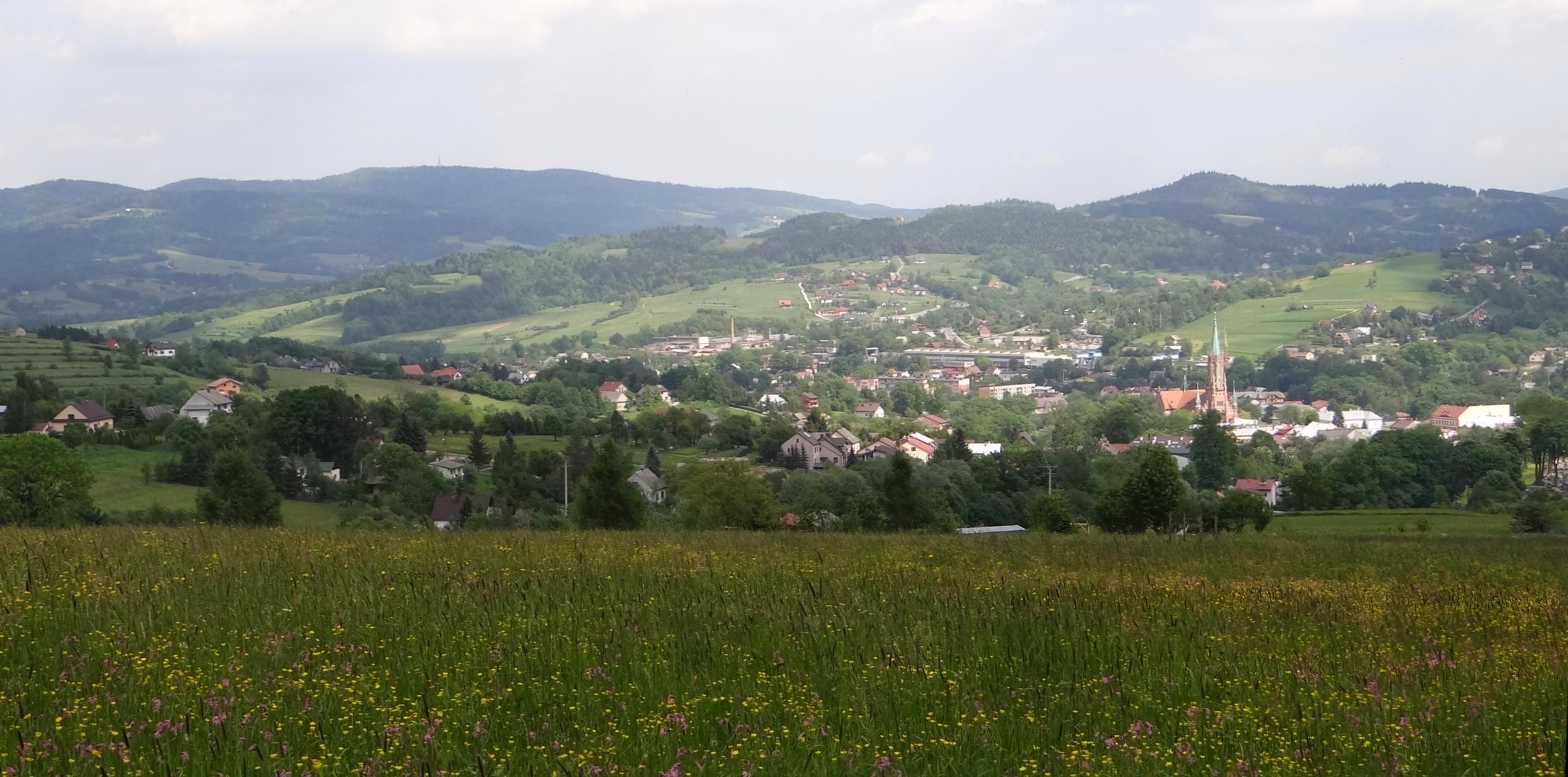 Grybów, Maślana Gora i Chełm